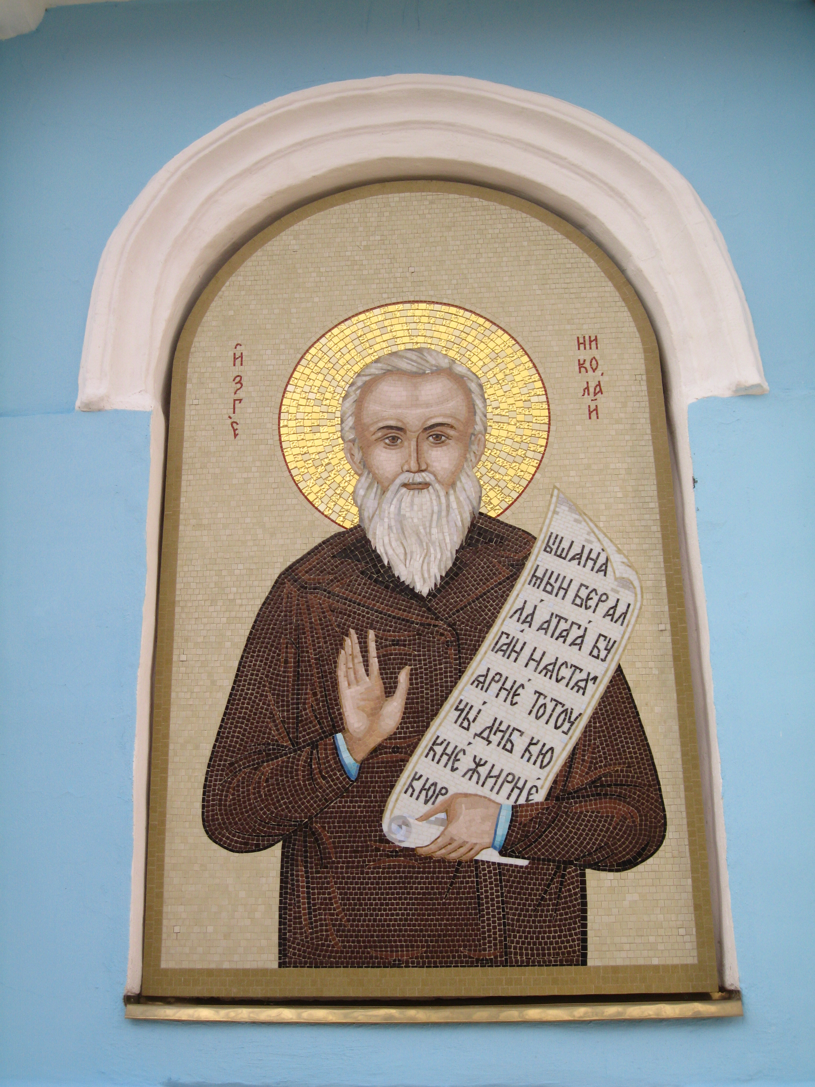 Мозаичное изображение Николая Чудотворца с надписями на церковно-кряшенском языке. Стена Тихвинской церкви в Казани, Татарстан, Россия